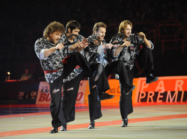 LE MUR, OU STENKA, L'ART DES COMBATS COLLECTIFS. LE STENKA EST UN SYSTEME MARTIAL ET SPORTIF QUI ESQUIVE LES PONCIFS ET TORD LE COU AUX BANALITÉS. C'EST UN SAVANT MÉLANGE QUI N'A QU'UN MOT D'ORDRE:L'EFFICACITÉ AU COMBAT. EN CONDITIONS RÉELLES COMME SPORTIVES.